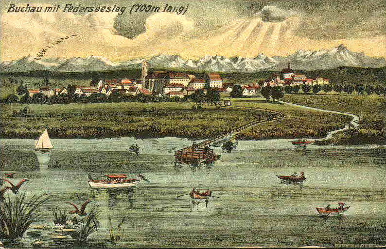 Ansichtskarte von Eugen Felle; Technoseum (Landesmuseum für Technik und Arbeit Mannheim)Motiv: Buchau mit Federseesteg